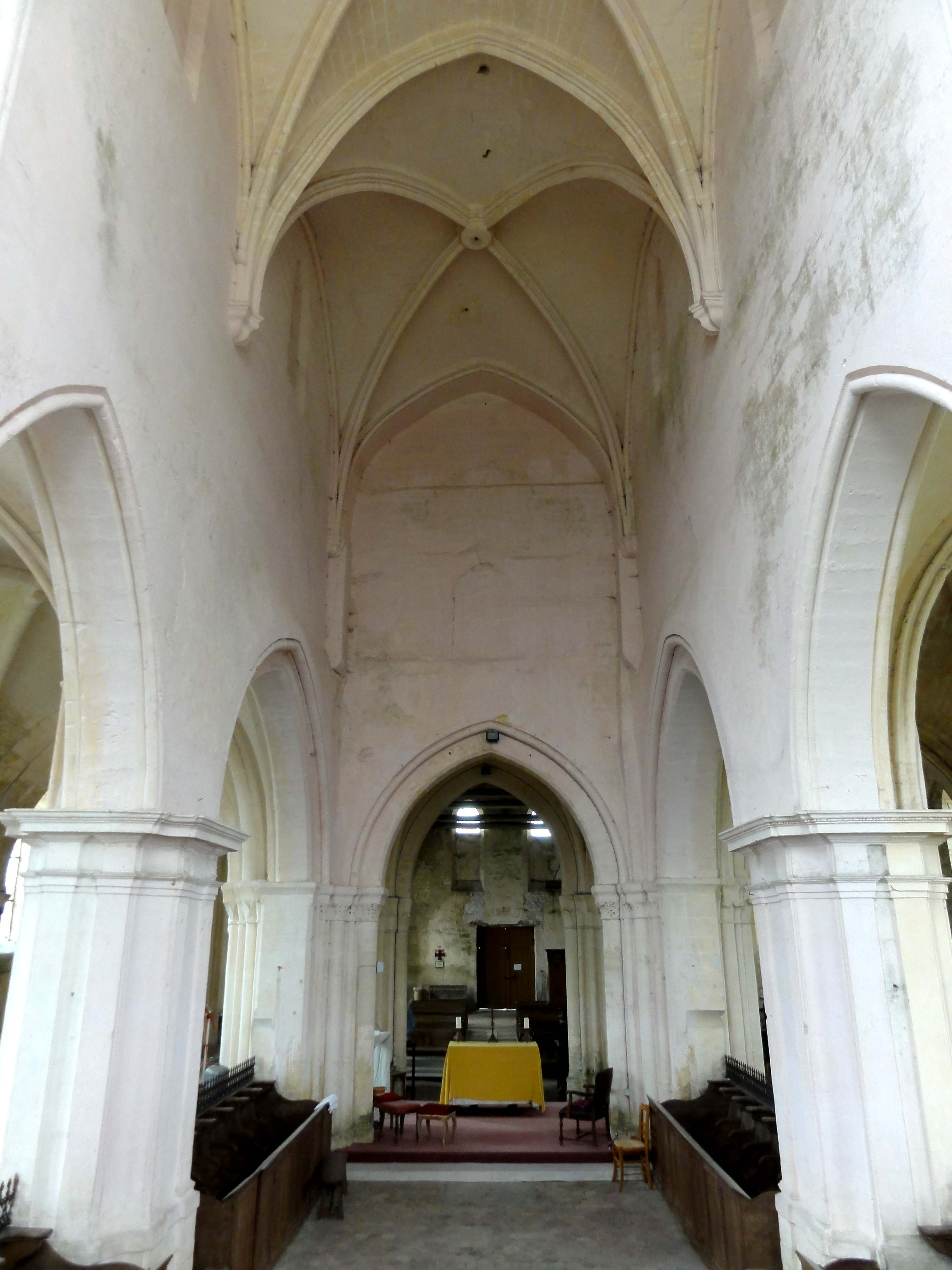 Intérieur de l'église (voir titre).